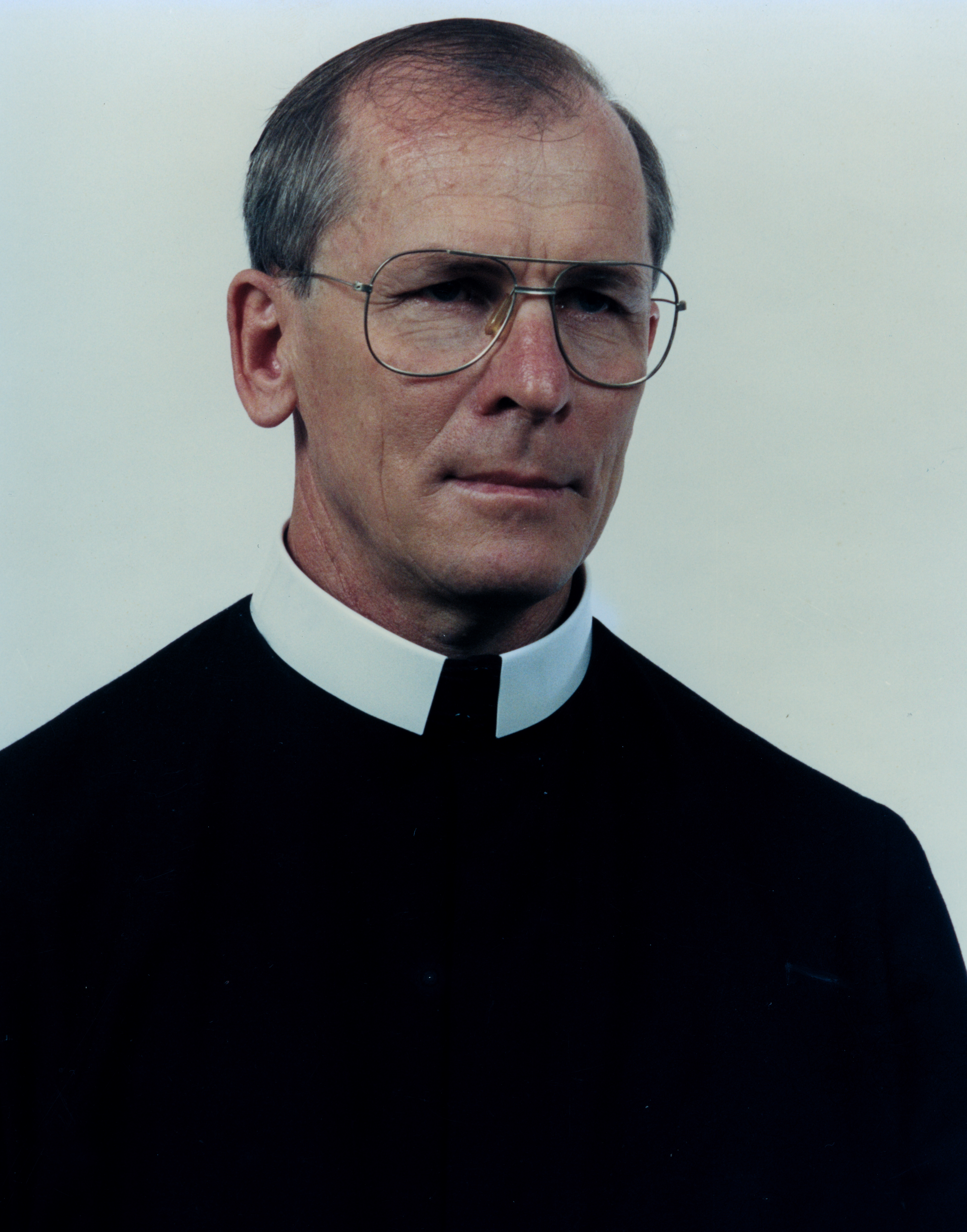 Dionisio Paulo Lachovicz 1996